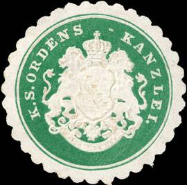 Sealing stamp Title: Königlich Sächsische Ordens - Kanzlei Description: grün, weiß, geprägt Place: Dresden size: 3 cm